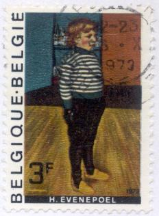 Timbre belge n°1686 du 13-10-1973. Reproduction du tableau Charles au jersey rayé de Henri Evenepoel (1872-1899). Charles est le fils de Henri.